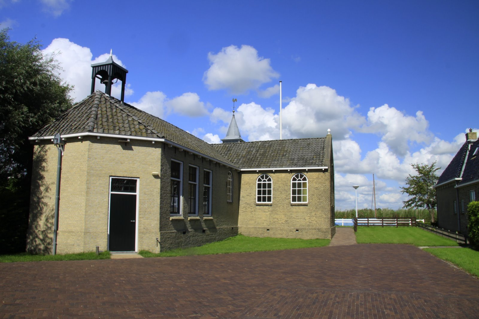 Het kerkje van het Heidenskip lekker in het zonnetje op een mooie dag in September.